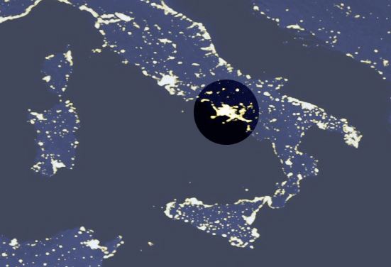 L'area metropolitana di Napoli in una visione satellitare notturna.